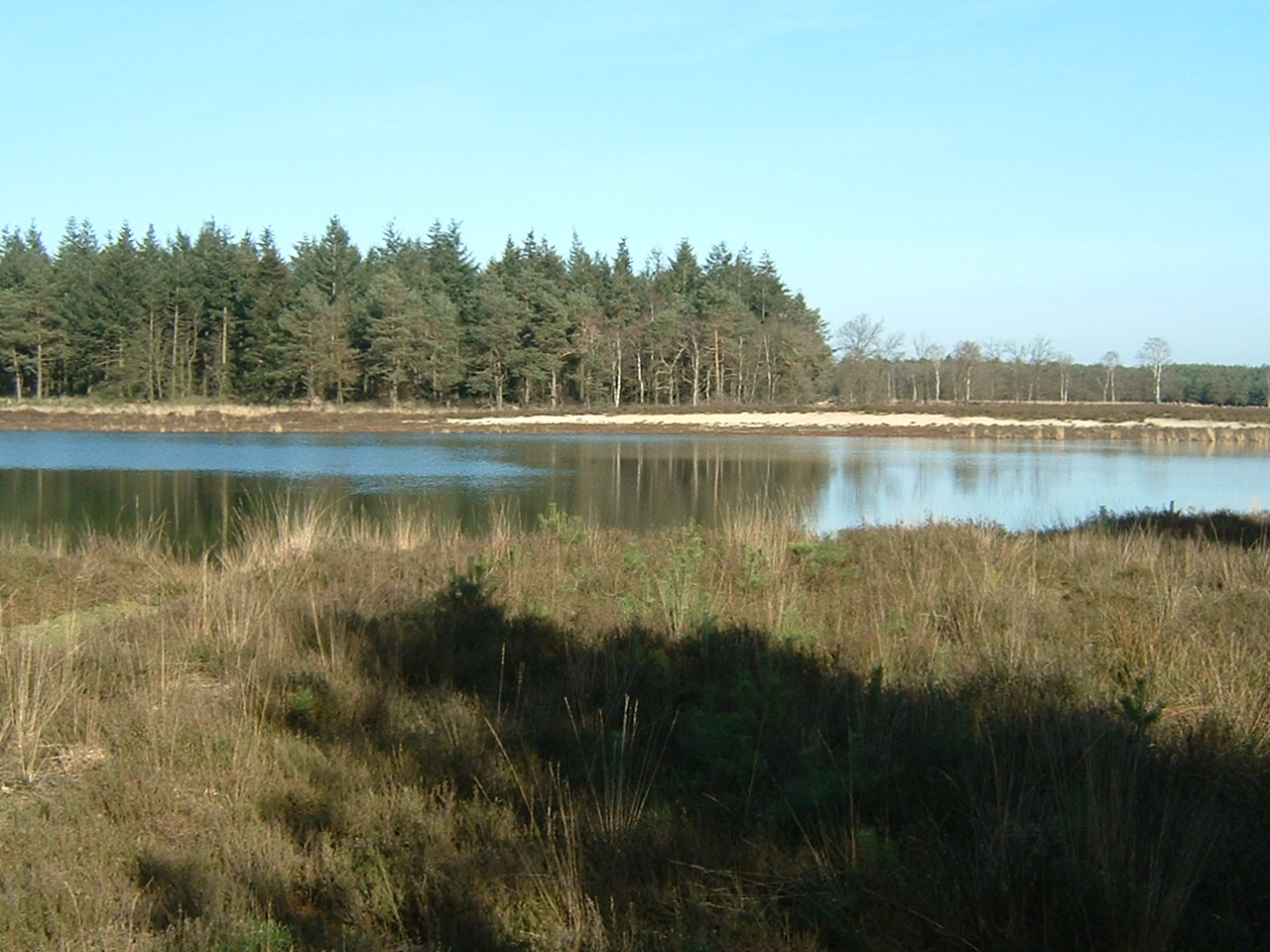 Eigen foto van Keelven (Natuurontwikkeling op de Someren se Heide)